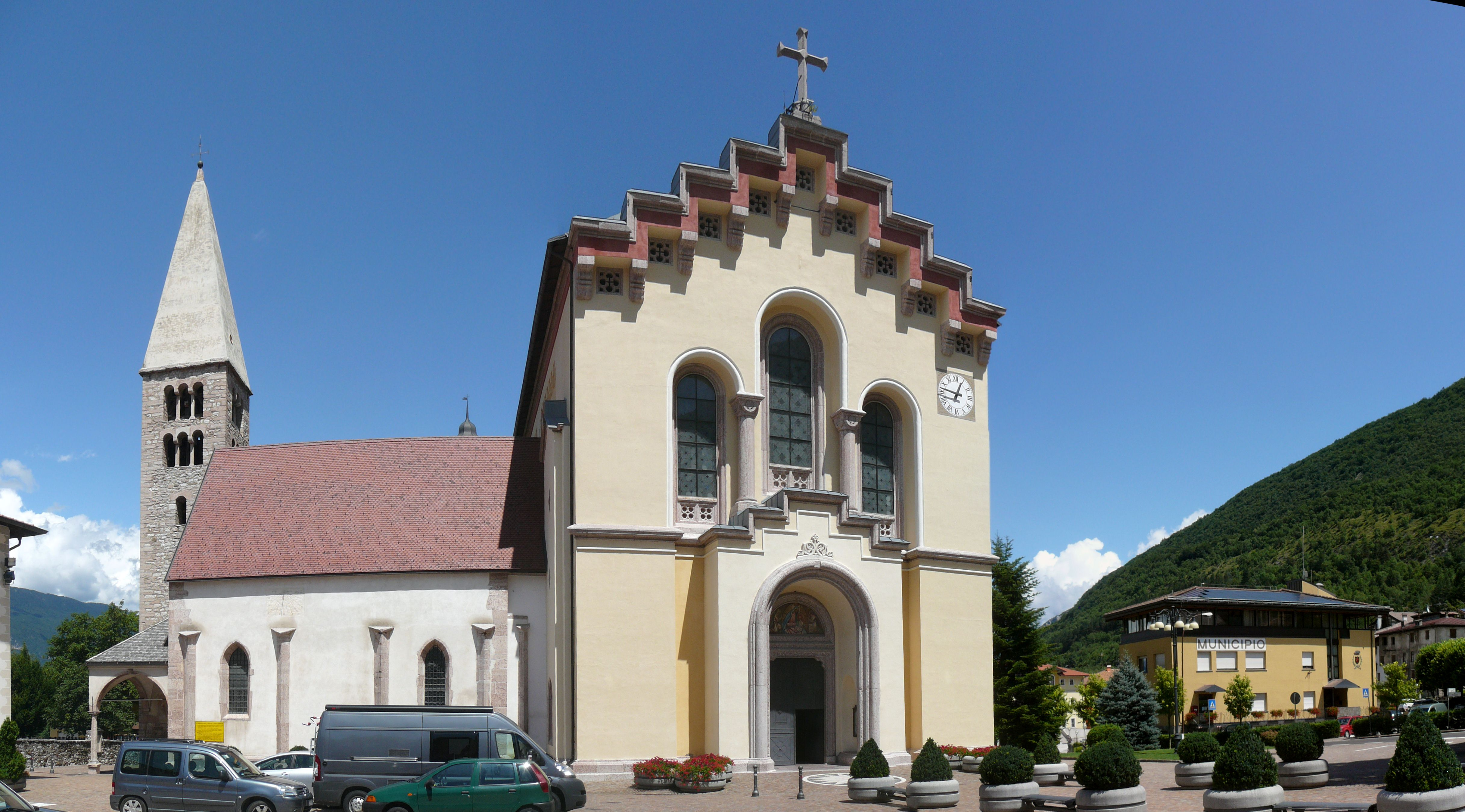 Parrocchiale di Spormaggiore